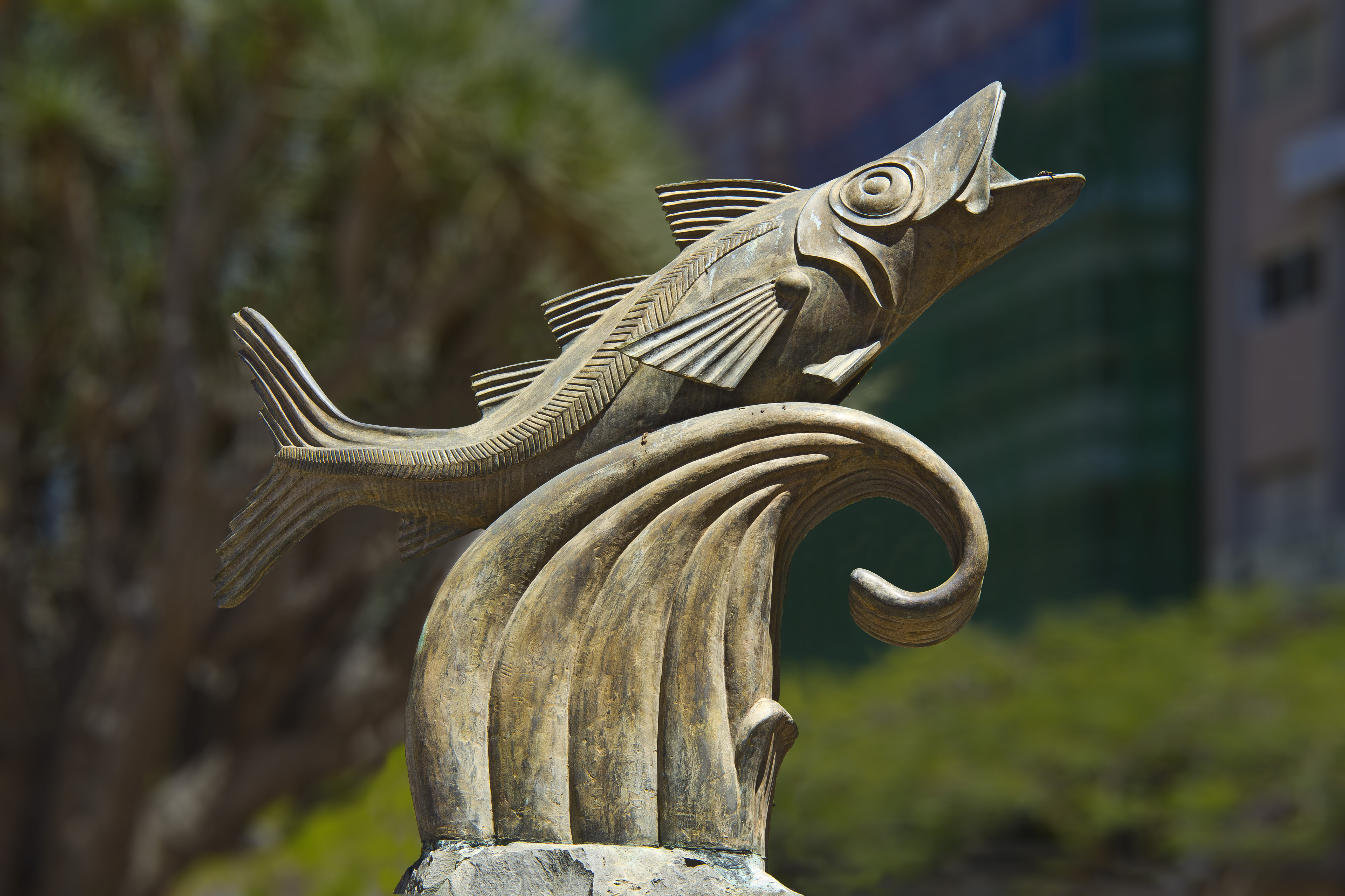 Die Bronzefigur einer Bastardmakrele “El Chicharro“ gilt als Symbolfigur für die Einwohner von Santa Cruz de Tenerife (los chicharreros). Die Plastik steht auf der „Plaza del Chicharro“ im Zentrum von Santa Cruz de Tenerife in Spanien. Die Plastik wurde von Francisco Javier Rodríguez de Armas und Evelina Martín Rodríguez geschaffen und befindet sich seit dem Jahr 2003 an ihrem heutigen Platz.